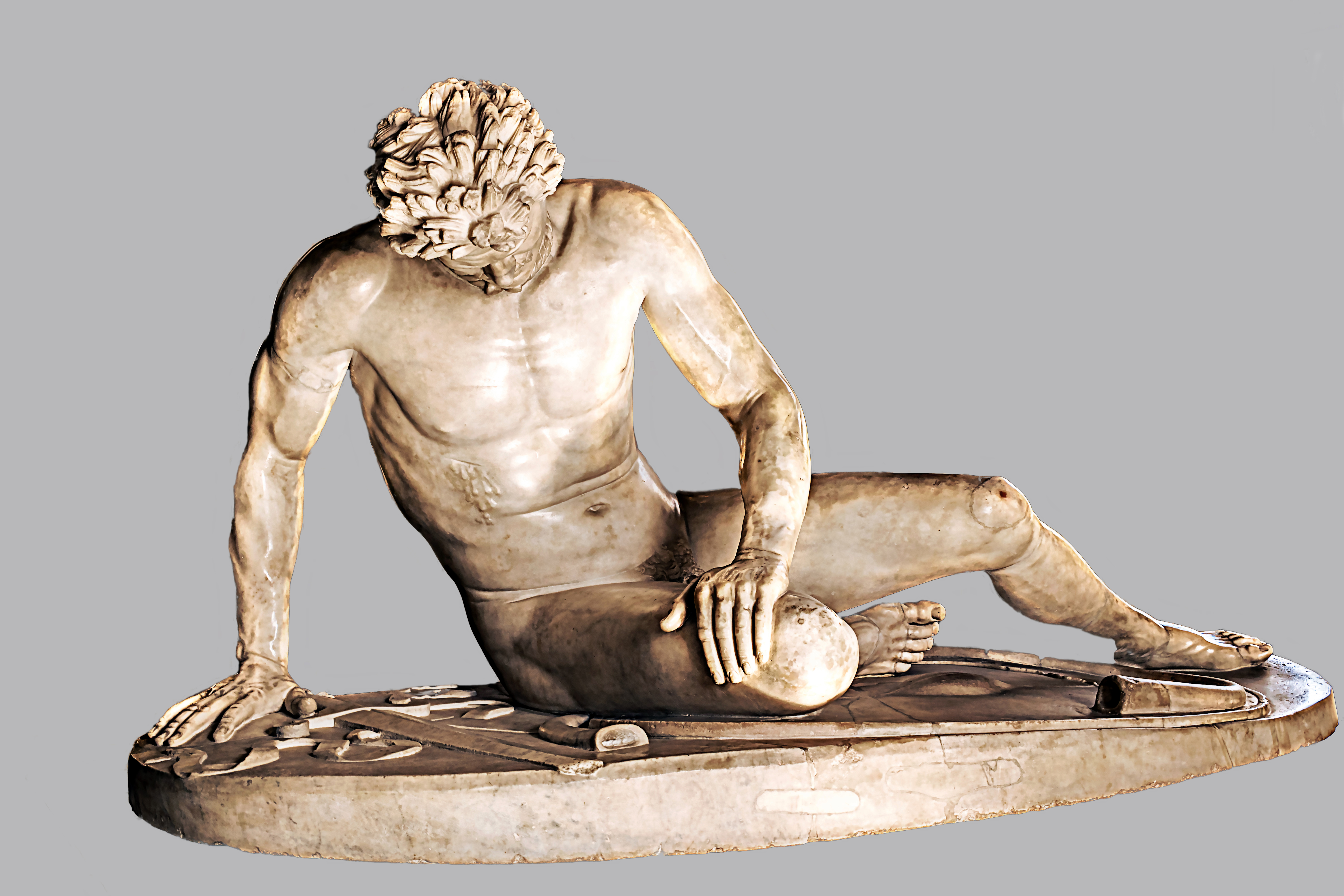 Antike Marmorstatue aus dem frühen 2. Jahrhundert v. Chr.; wahrscheinlich eine römische Kopie nach einem griechischen Original aus dem 3. Jahrhundert v. Chr., dass aus Bronze beschaffen war. Das Exponat ist heute in den Kapitolinischen Museen in Rom ausgestellt.